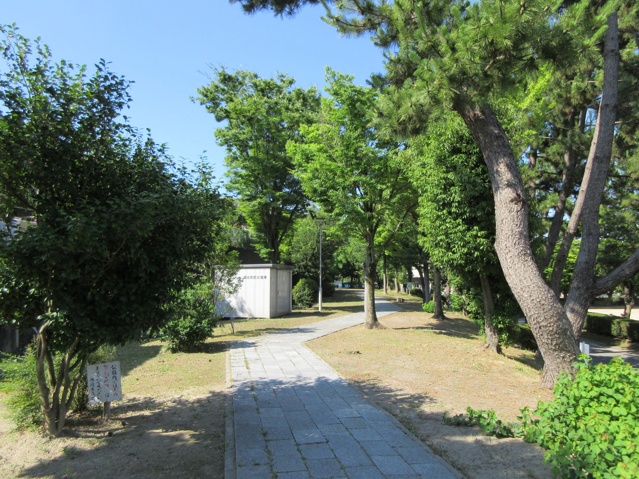 柿田川緑道（岡崎市城北町）